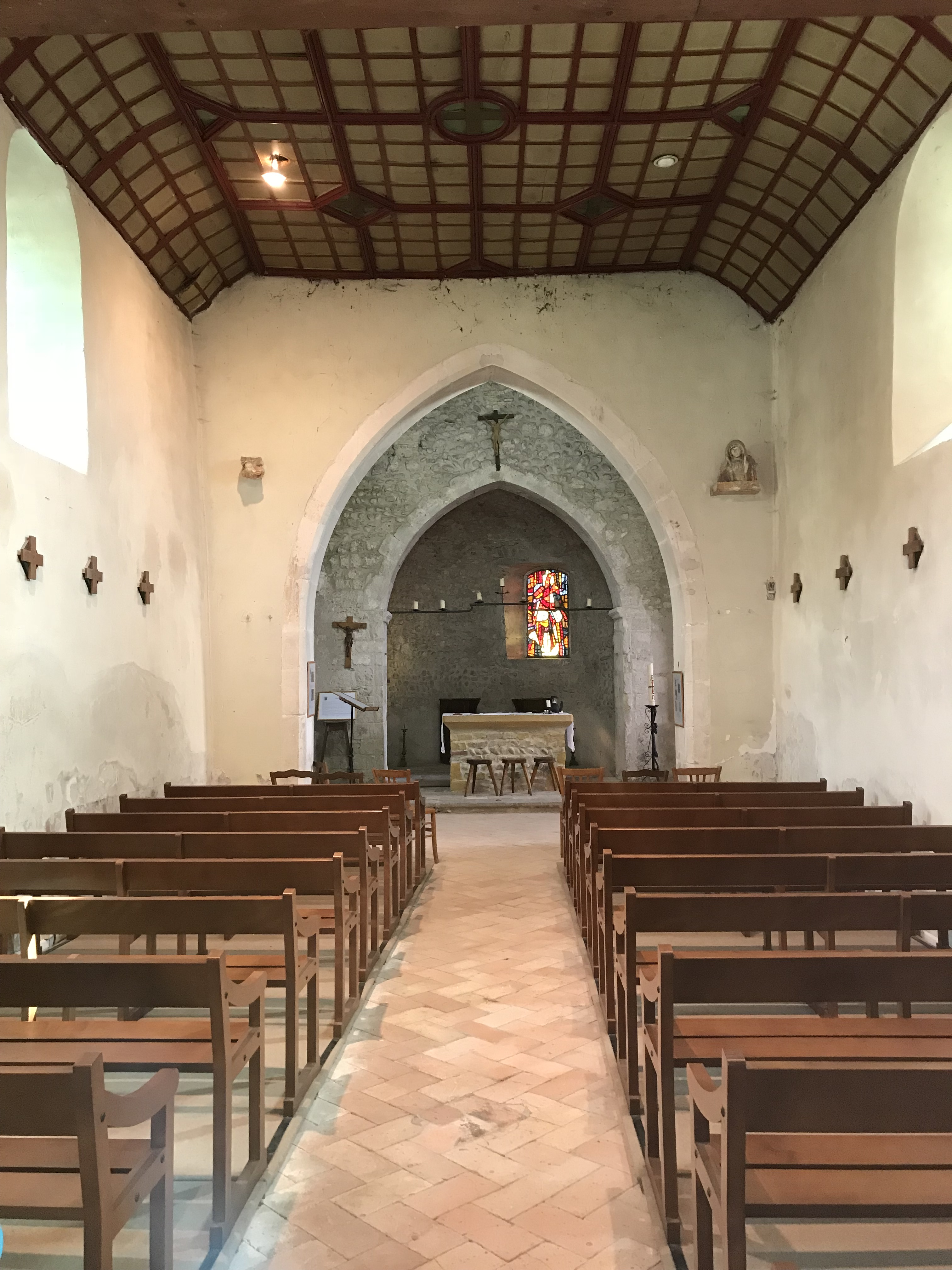 Intérieur de l'église Saint-Maurice de Saint-Maurice-de-Beynost en septembre 2018.